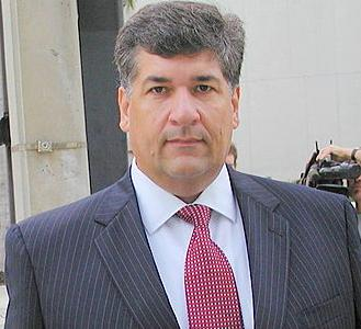 Alejandro Antonini es el hombre de la valija -valijagate a quien le comisaron casi 800 mil dólares a su llegada a Buenos Aires en vuelo procedente de Caracas Venezuela. El dinero se presume iba destinado a financiar la campaña presidencial de la ahora presidenta. La foto corresponde a momentos antes de llegar a edificio de tribunales en Miami para testificar en el juicio contra Franklin Durán